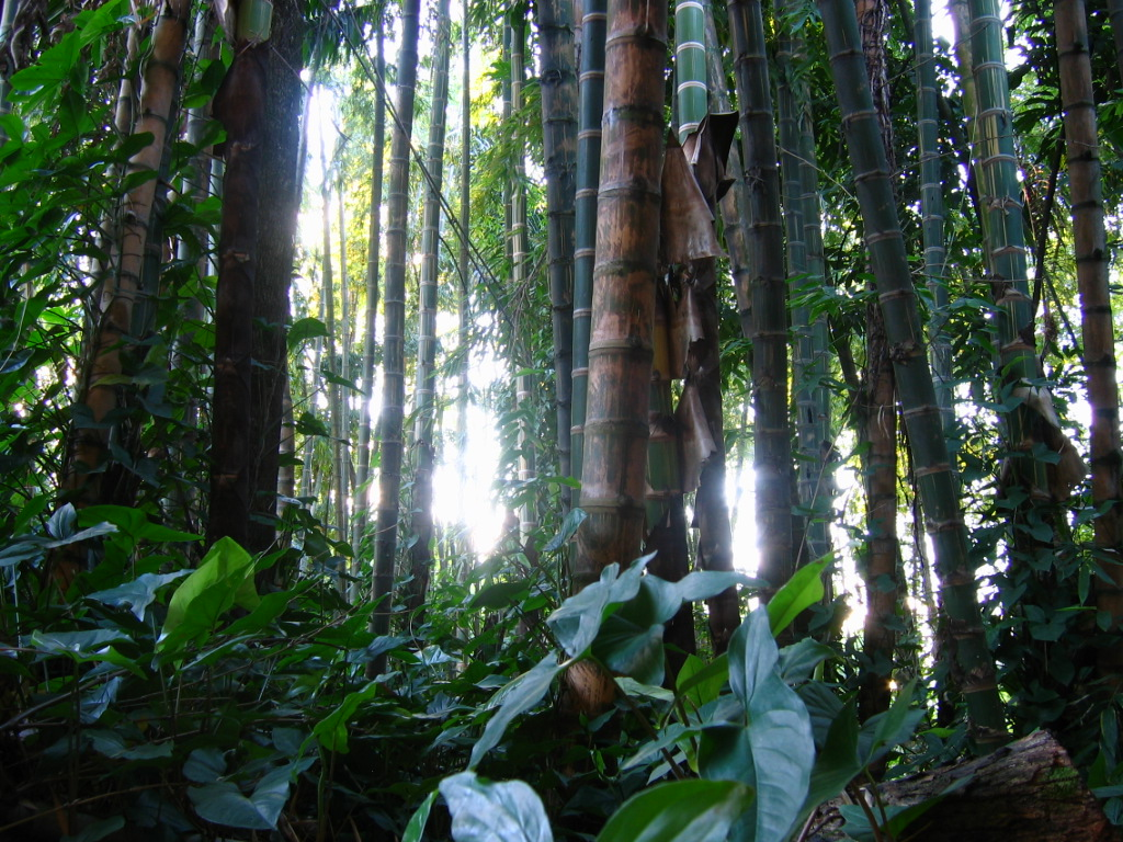 Bosque de Guadua (un tipo de Bambú) en el Jardín Botánico de Medellín, Colombia.